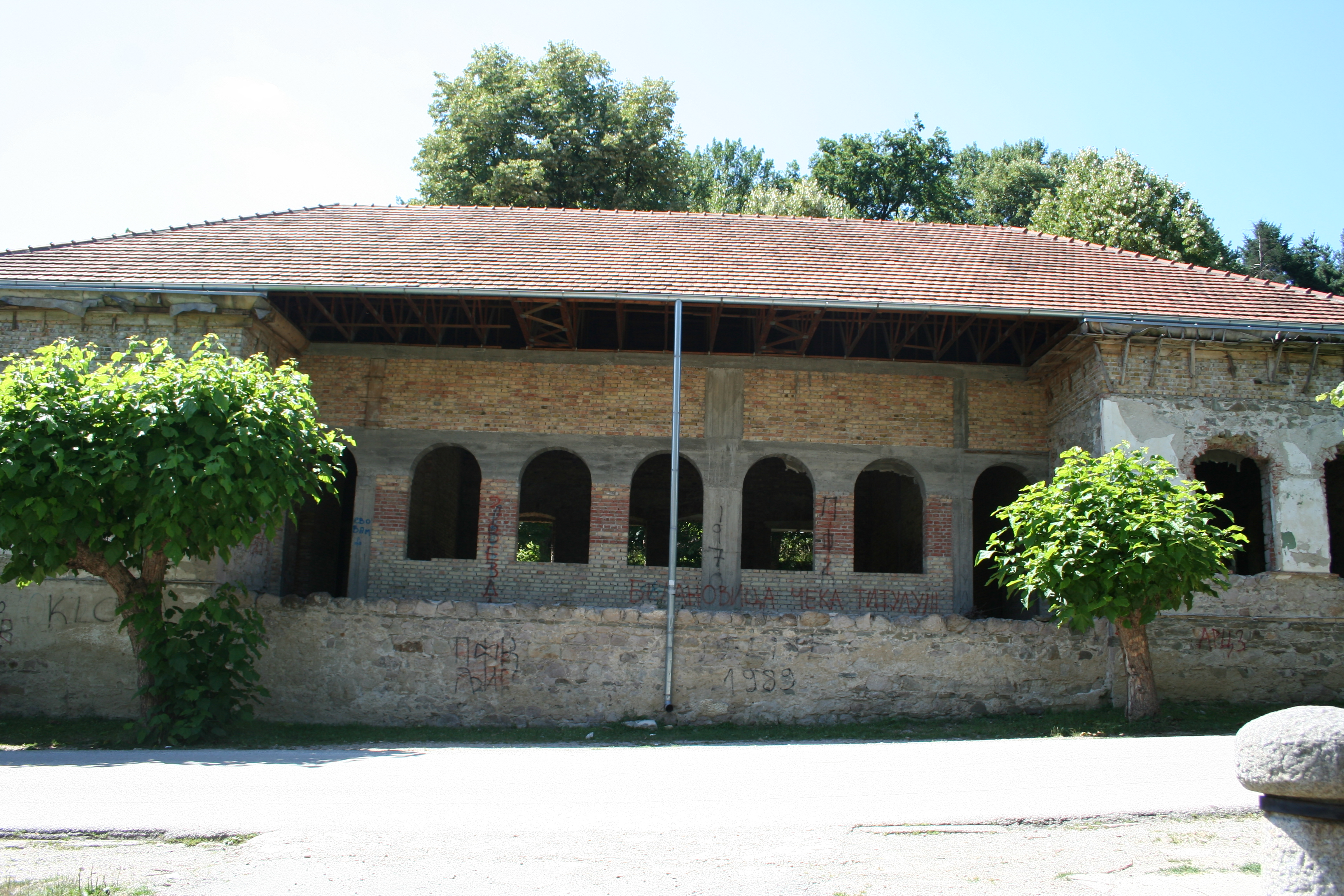 Stara škola Belanovica